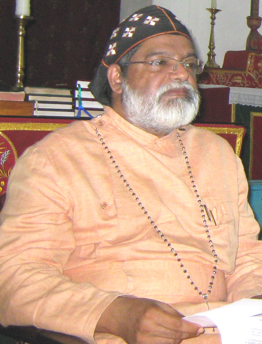 ഡോ. തോമസ് മാർ അത്താനാസിയോസ് മെത്രാപ്പോലീത്ത